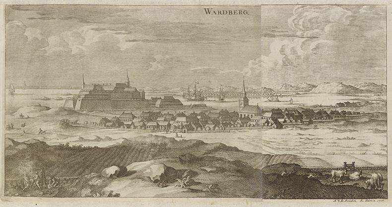 Panoramabild över Varberg